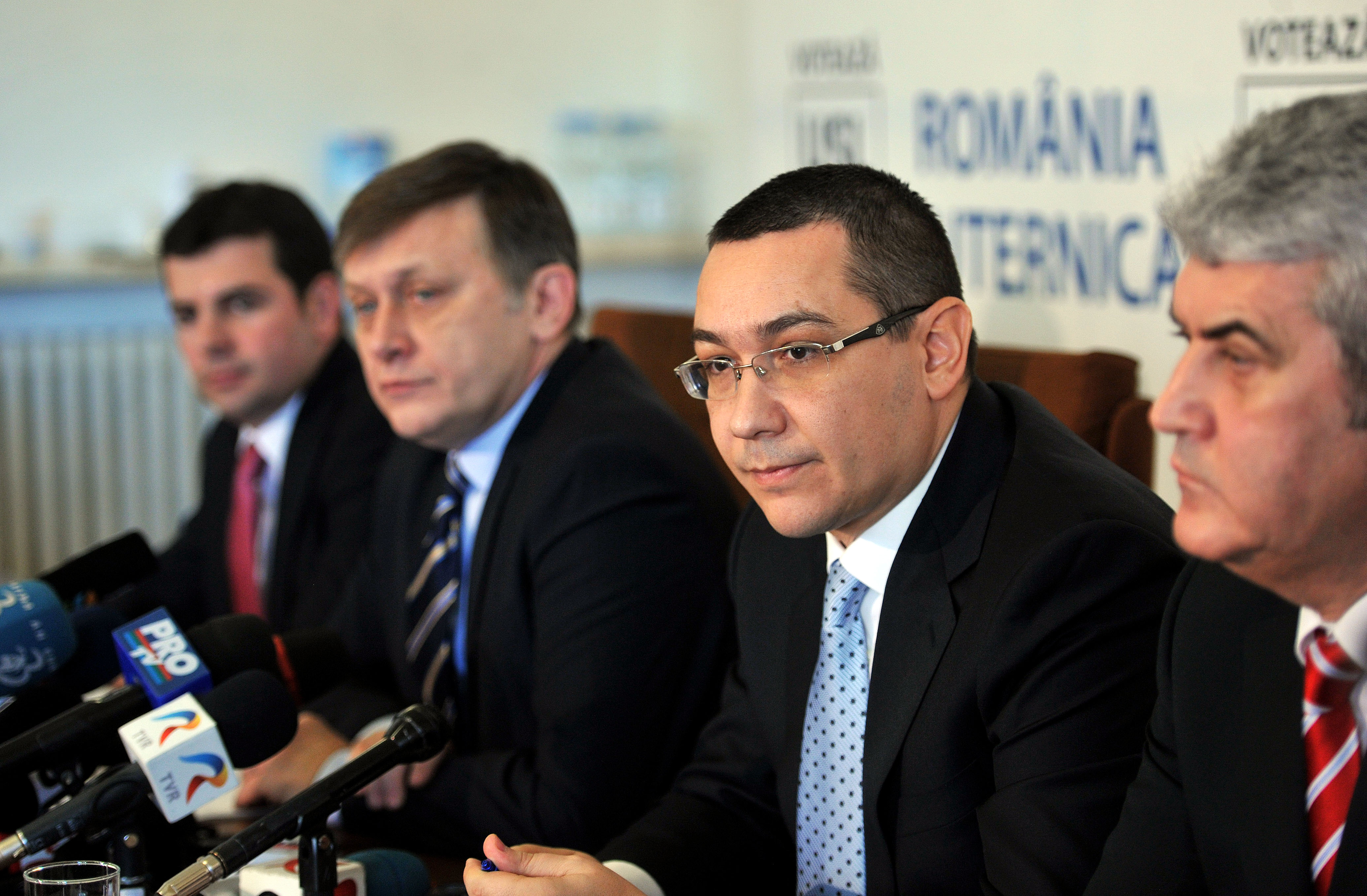 Victor Ponta la reuniunea USL - 13.01.2014 (6)